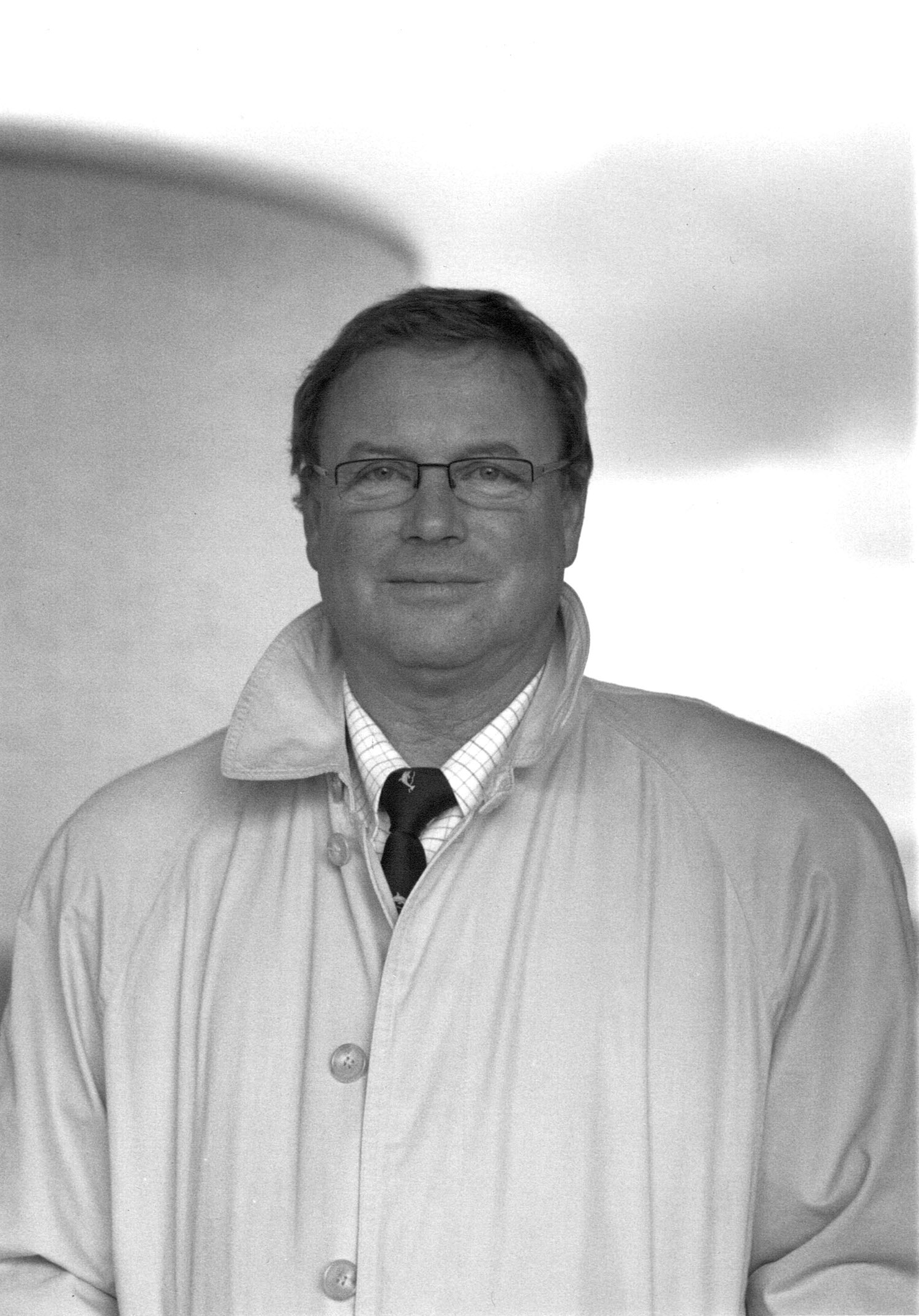 Fotografie von Lars U. Scholl